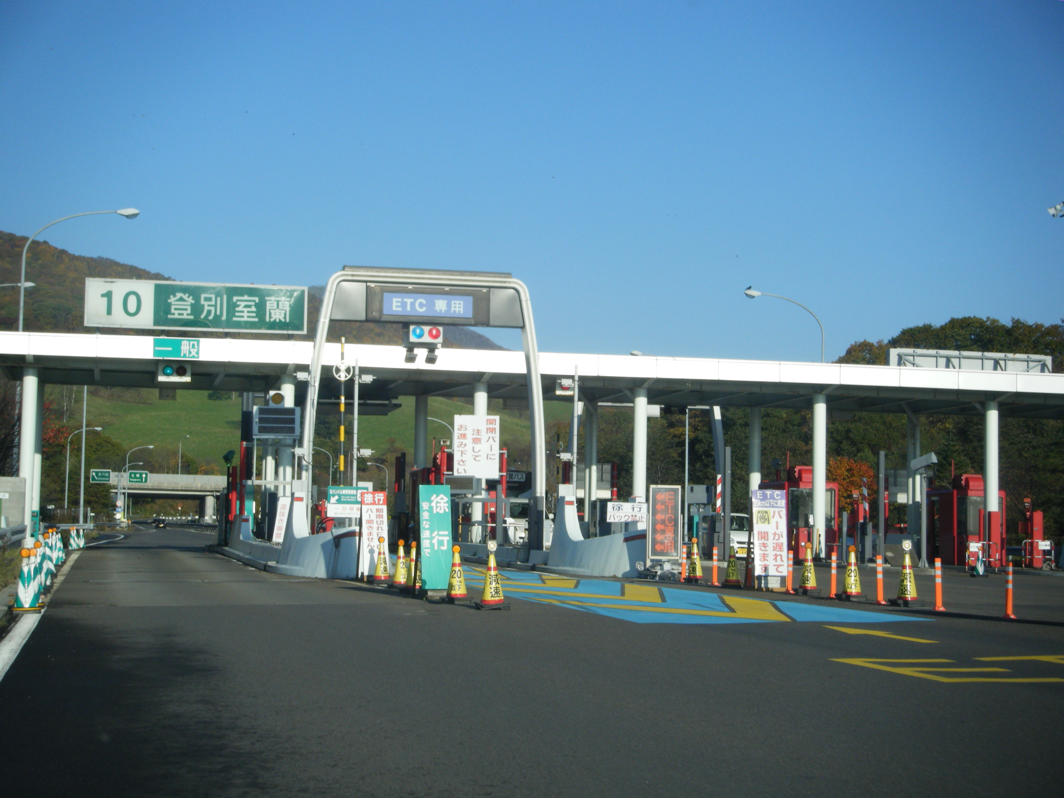 登別室蘭インターチェンジ。車内（助手席）より撮影。